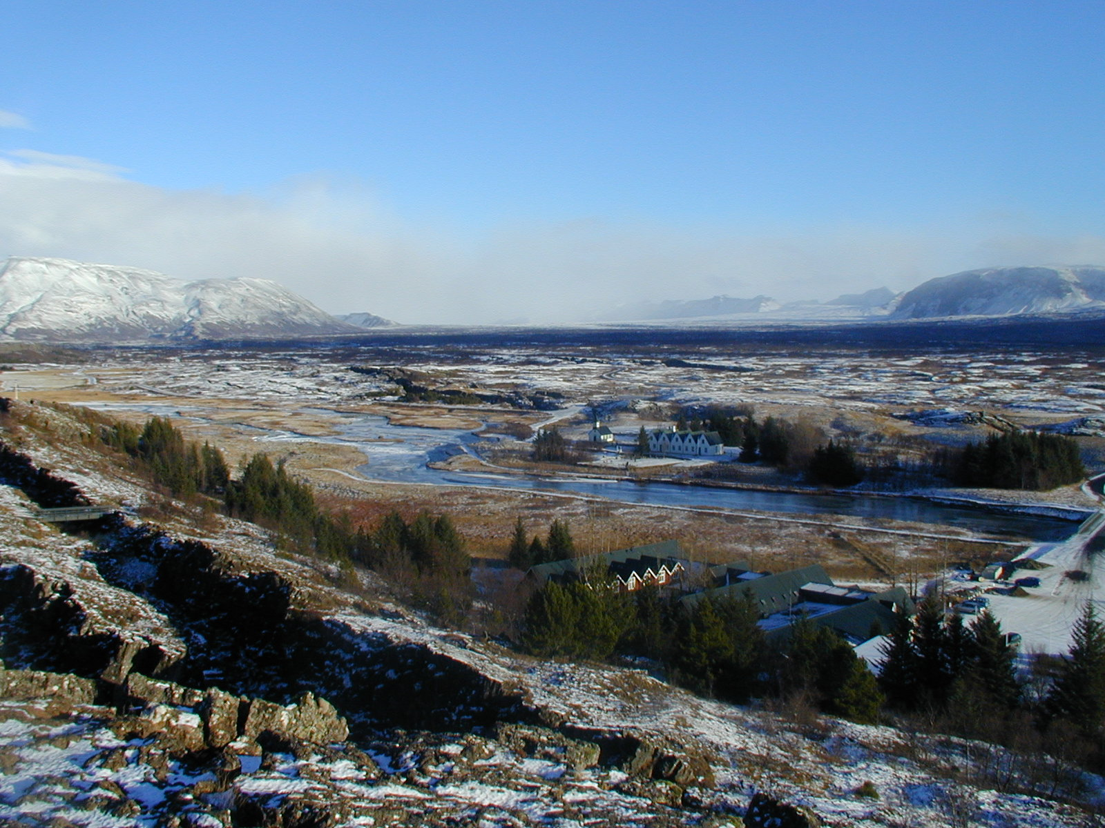 Þingvellir in Winter.